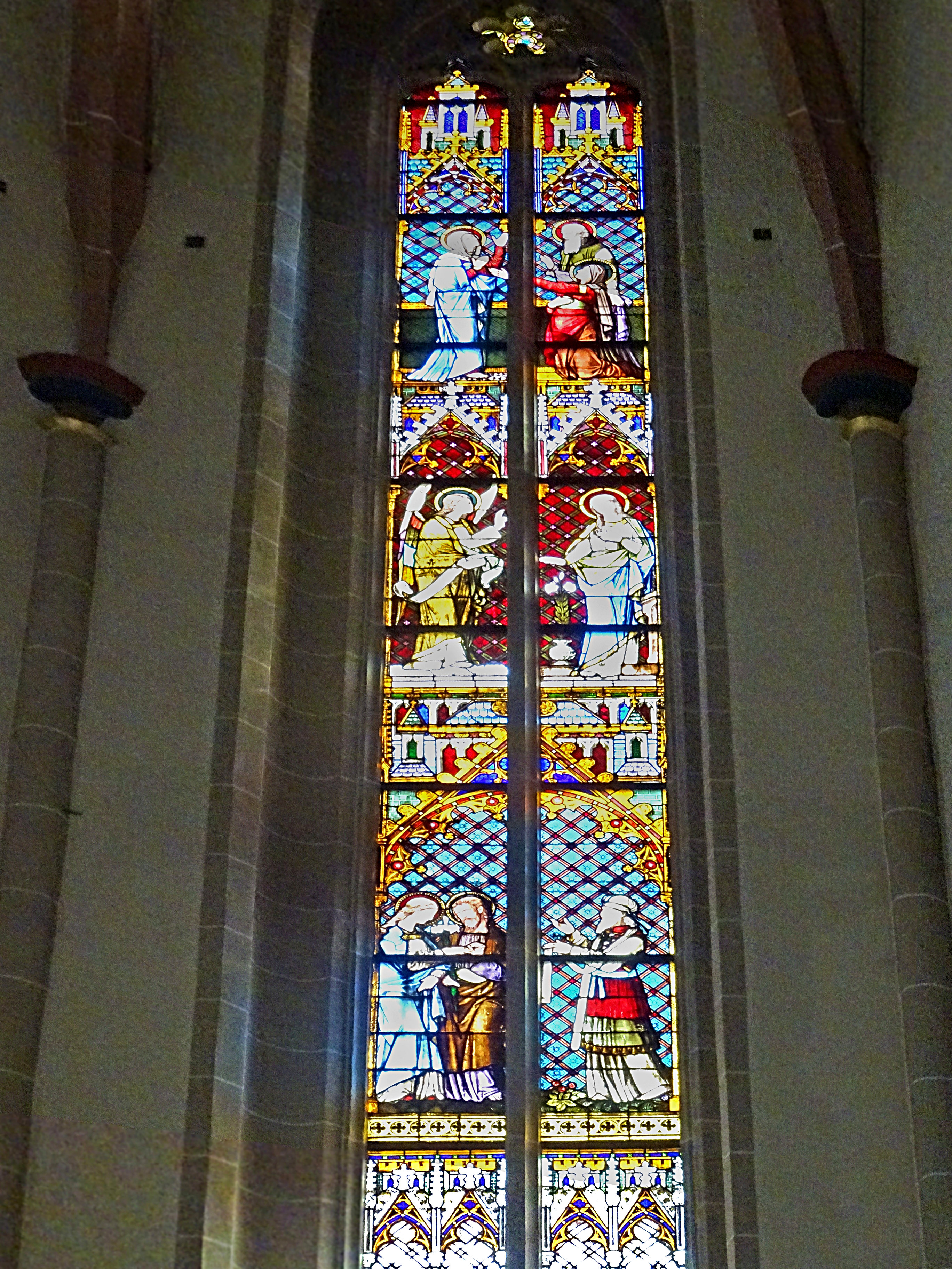 rechtes Chorfenster (1884, Verlobung Maria und Joseph / Verkündigung Mariens / Heimsuchung) in der Pfarrkirche St. Gertrud (Dingelstädt)